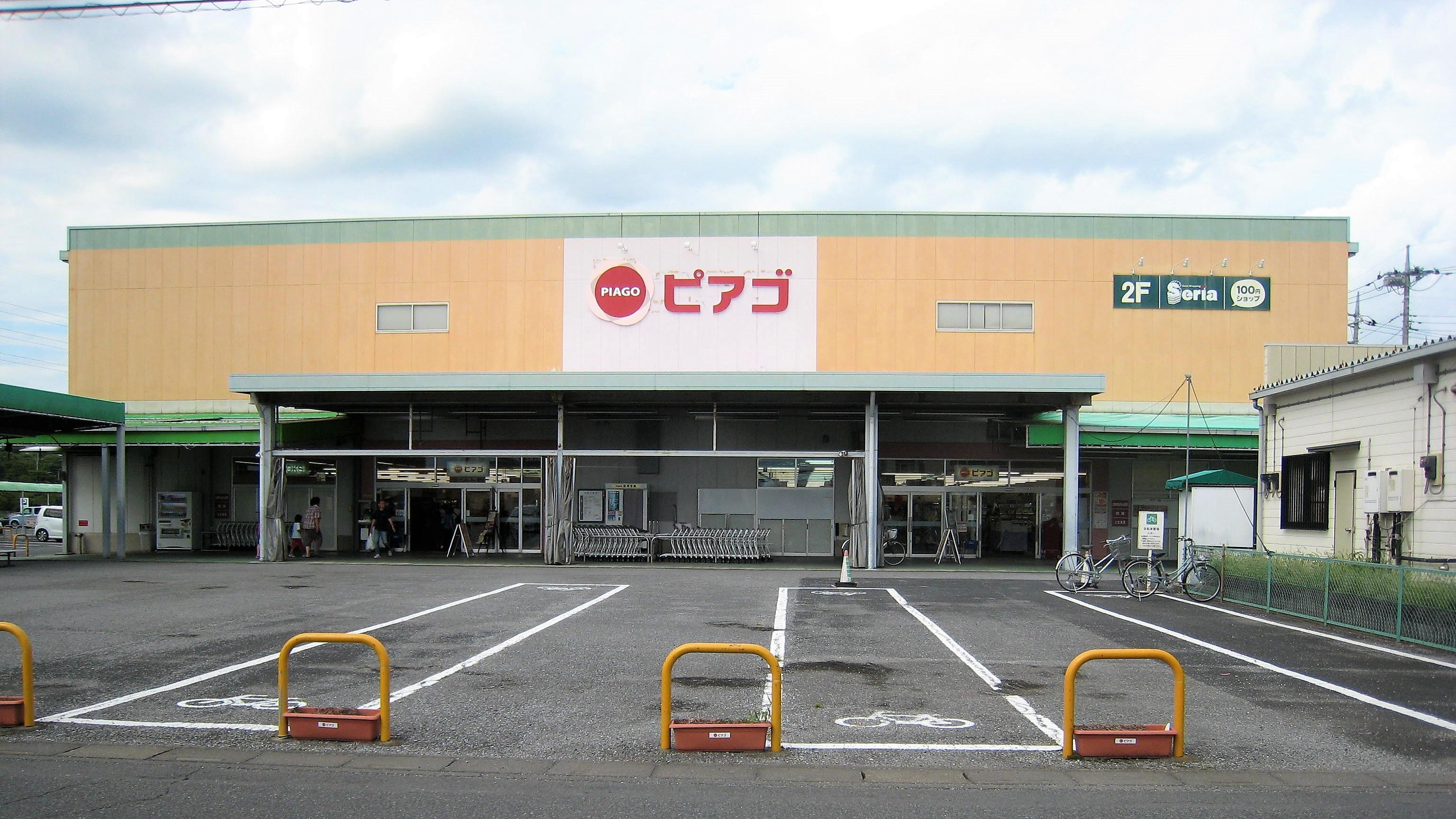 埼玉県加須市にあるピアゴ大桑店の外観